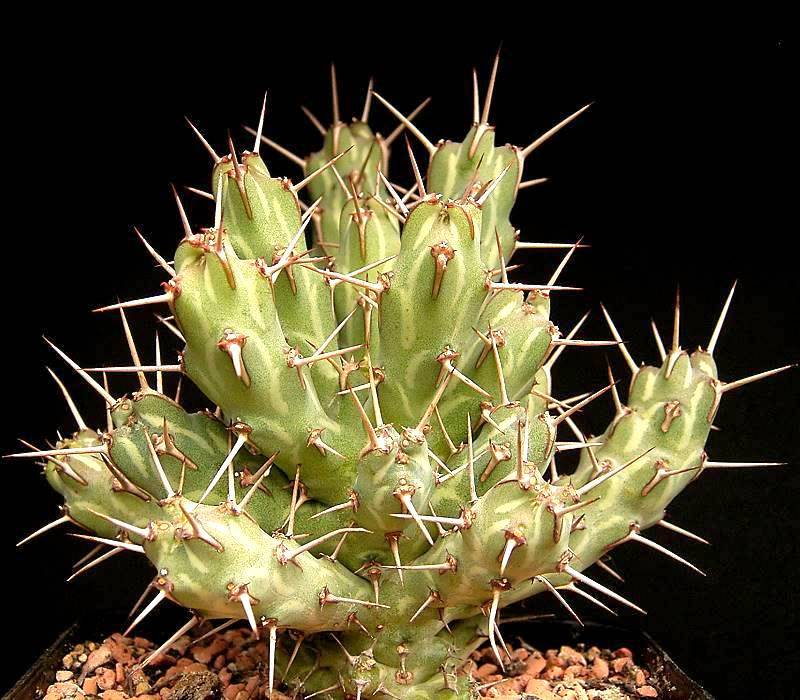 Euphorbia erigavensis